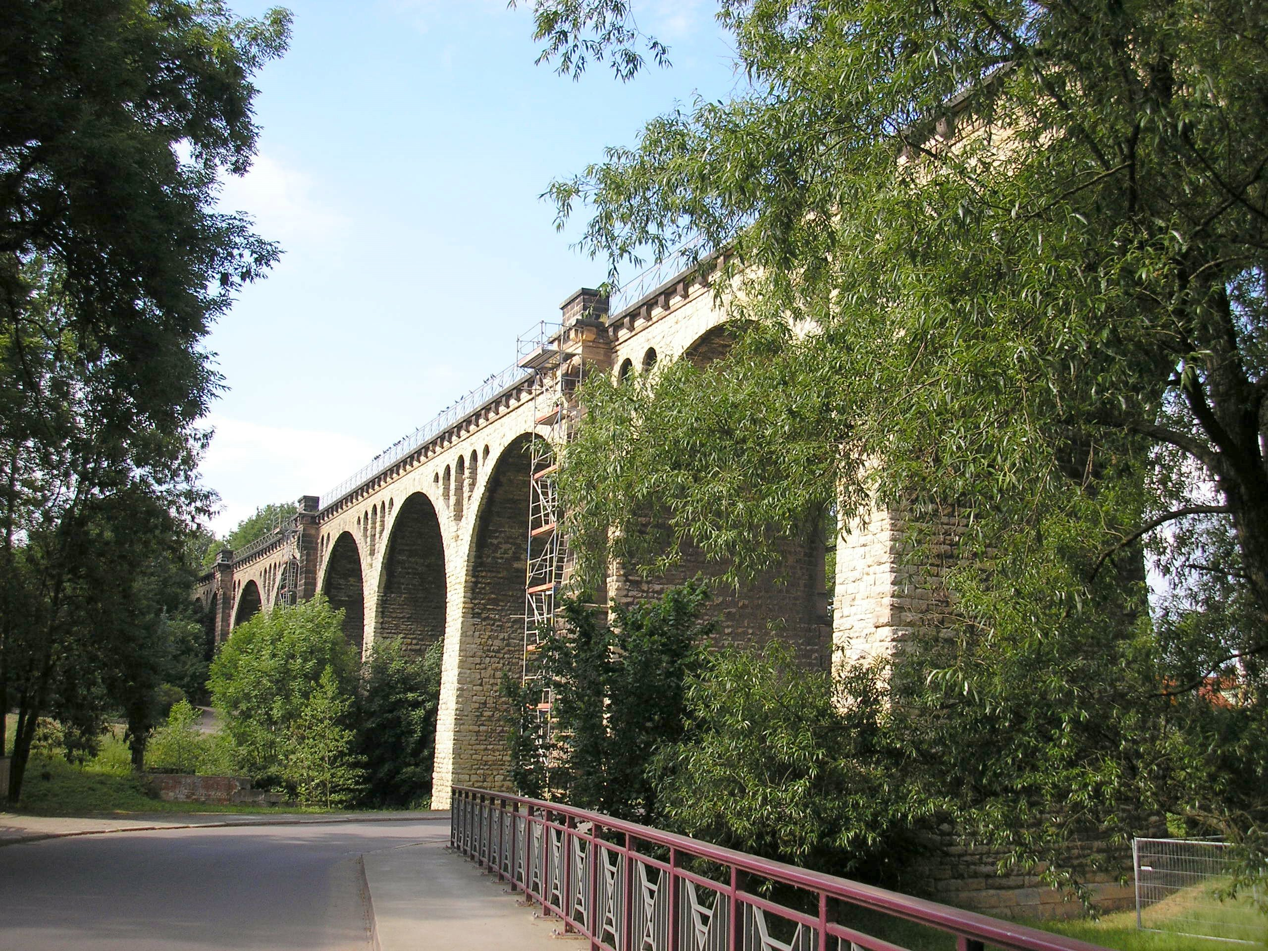 Das Viadukt der Bahnstrecke Arnstadt-Saalfeld über das Ilmtal in Stadtilm (westlicher Teil). Erbaut 1894.